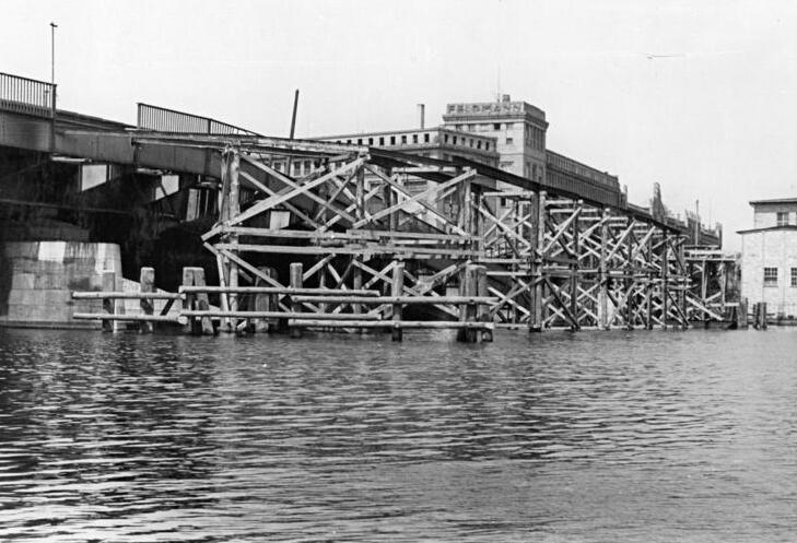 Berlin, Treskowbrücke, Wiederaufbau Wiederherstellung der Treskow-Brücke in Berlin. Die Treskow-Brücke in Berlin-Oberschöneweide wird jetzt wieder instandgesetzt. UBz: Die Treskow-Brücke, davor die im Bau befindliche Notbrücke. Aufn.: Illus Funck 1 7052-50 30.6.1950